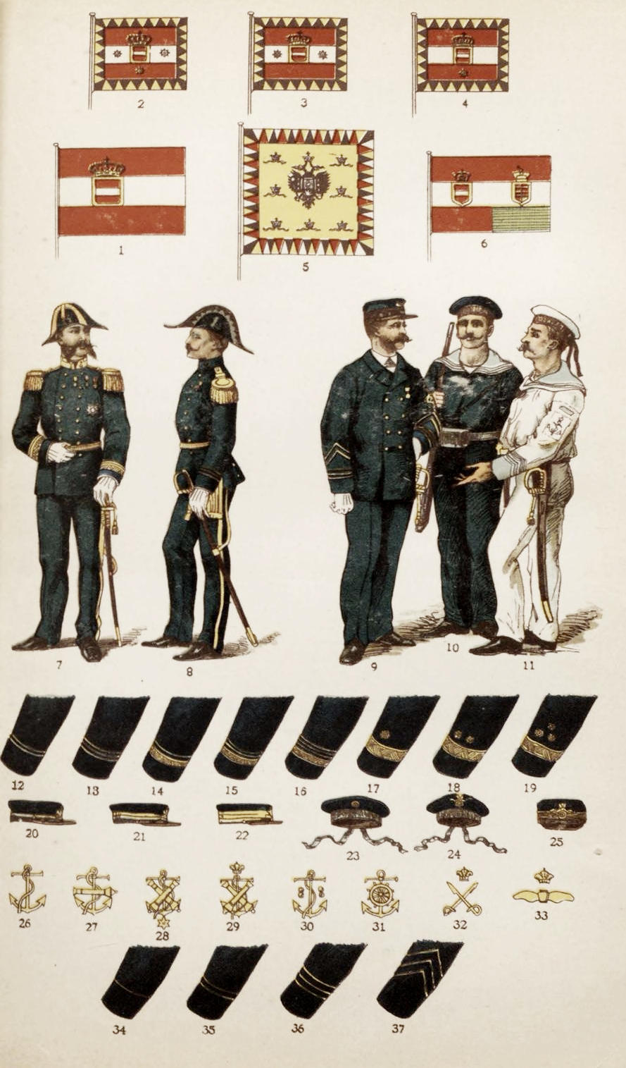 Изображение из «Военной энциклопедии» изданной книгоиздательским товариществом Ивана Дмитриевича Сытина. Санкт-Петербург); 1911—1915 гг. Фото к статье «Австро-Венгрия». Объяснение рисунков к таблице австро-венгерского флота: 1 - военный флаг и гюйс. 2 - адмиральский флаг. 3 - вице-адмиральский флаг. 4 - контр-адмиральский флаг. 5 - Императорский штандарт. 6 - коммерческий флаг. 7 и 8 - офицеры. 9, 10, 11 - нижние чины. Шитье на рукавах: 12 - мичман. 13 - лейтенант. 14 - капитан-лейтенант. 15 - капитан 2-го ранга. 16 - капитан 1-го ранга. 17 - контр-адмирал. 18 - вице-адмирал. Фуражки: 20 - обер-офицер. 21 - штаб-офицер. 22 - адмирал. 23 - матрос. 24 - унтер-офицер. 25 - боцман (кондуктор). Вышитые значки на рукавах: 26 - матрос первой статьи. 27 - наводчик. 28 - пулемётчик. 29 - комендор (артил. унтер-офицер). 30 - минёр (минный унтер-офицер). 31 - рулевой. 32 - стрелок унтер-офицерского звания. 33 - машинный унтер-офицер. 34 - боцманмать. 35 - боцман (кондуктор). 36 - старший боцман (кондуктор). 37 - десять лет сверхсрочной службы.